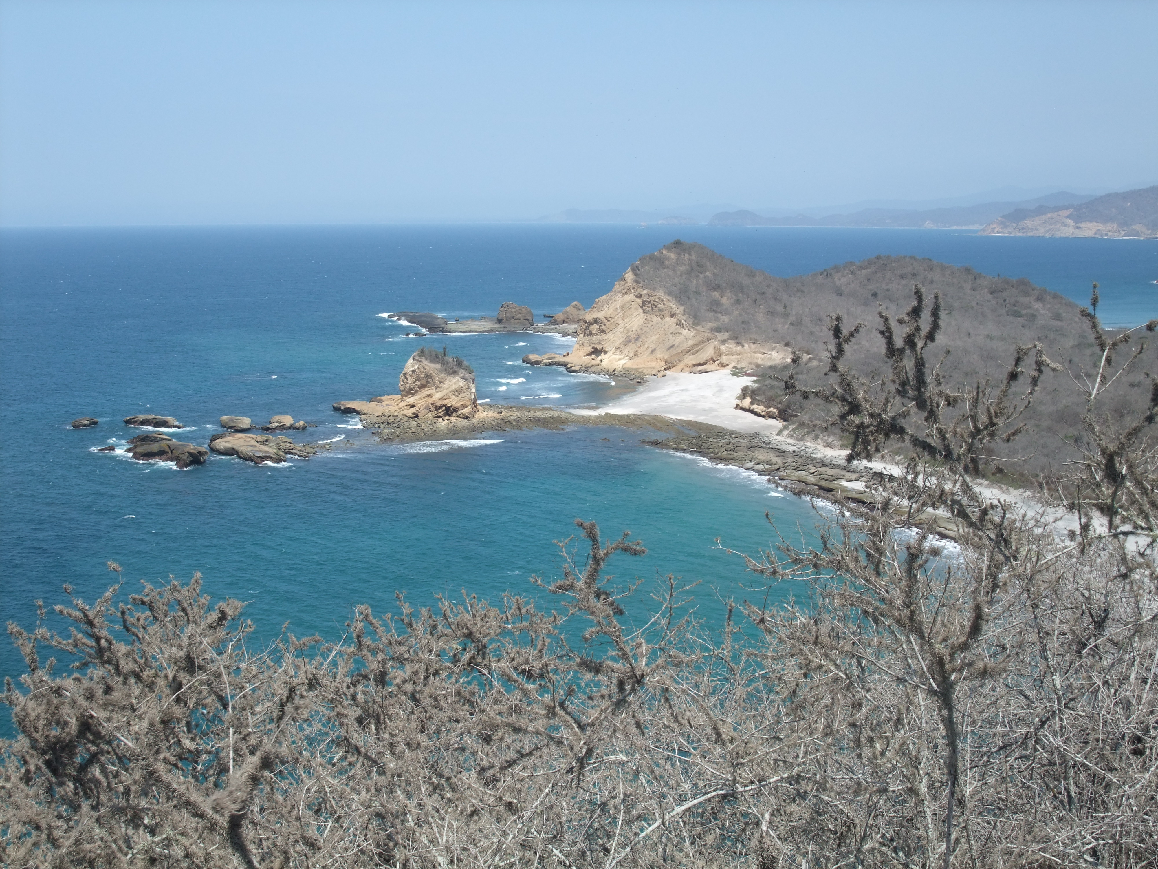 Küste mit Felsen im Nationalpark Machalilla in Ecuador